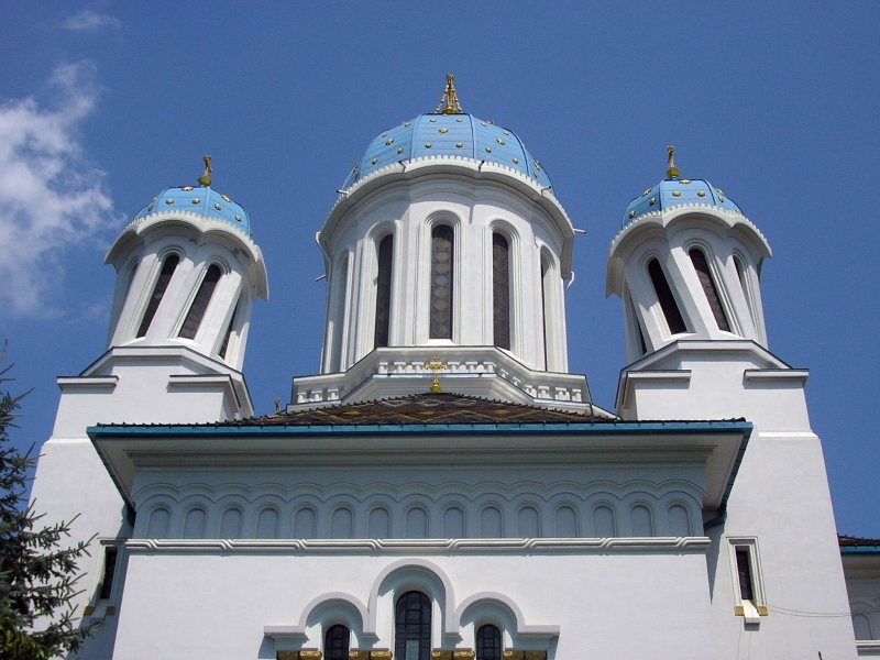 Tzv. Opilý kostel Sv. Mikuláše